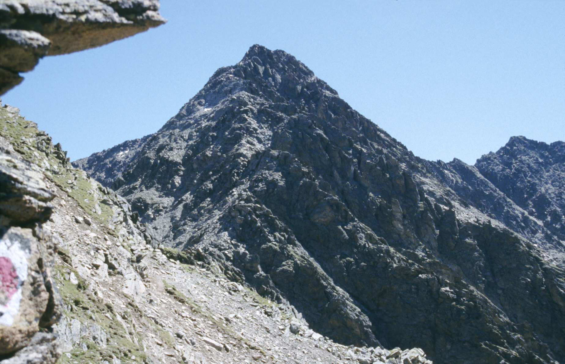 Hochreichkopf von Nordwesten, Aufnahmeort in der Nähe der Niederreichscharte